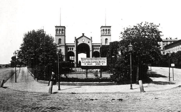 Märkischer Bahnhof in Breslau, erbaut von der Niederschlesisch-Märkischen Eisenbahn